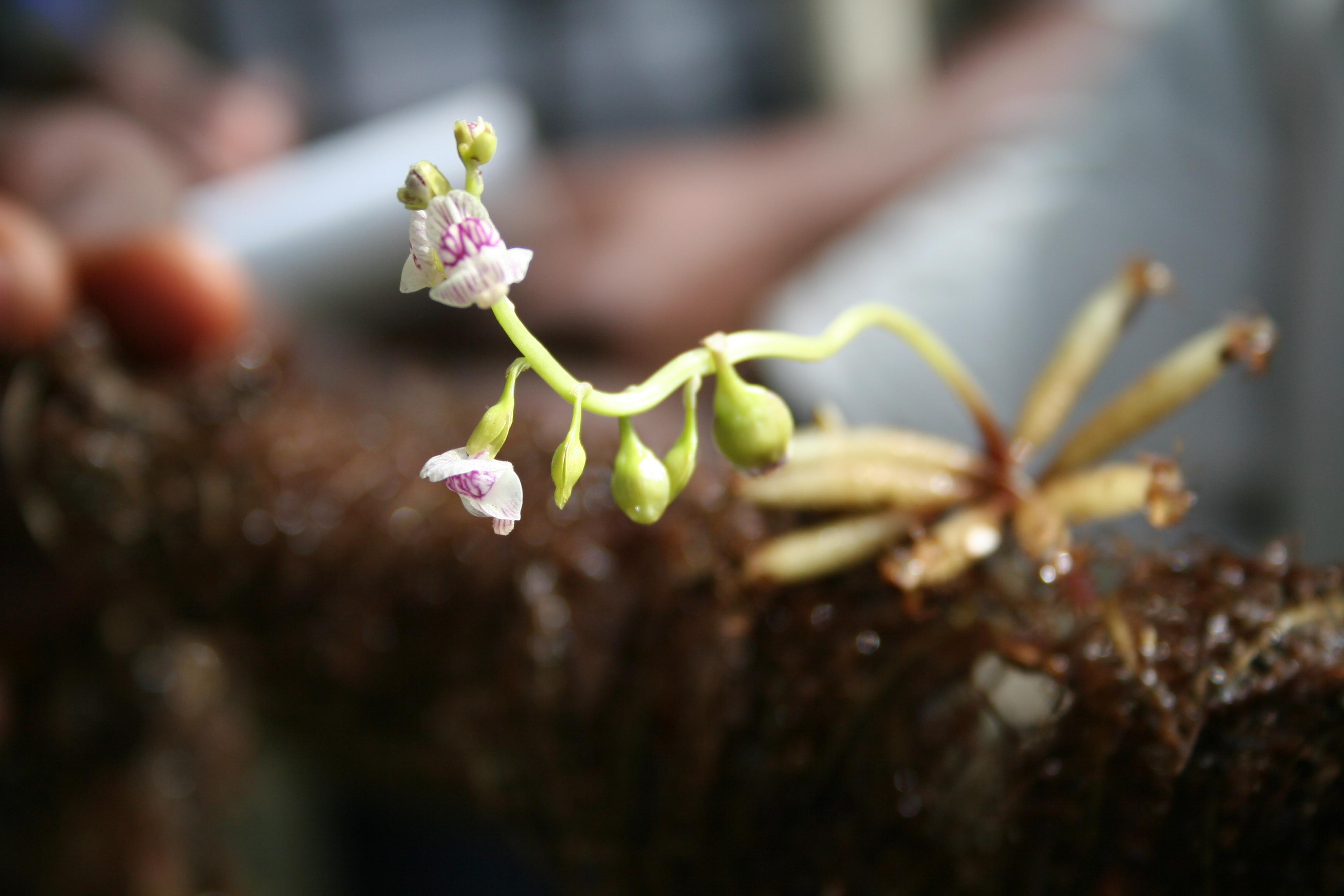 Utricularia inflexa, near Bama, SW Burkina Faso